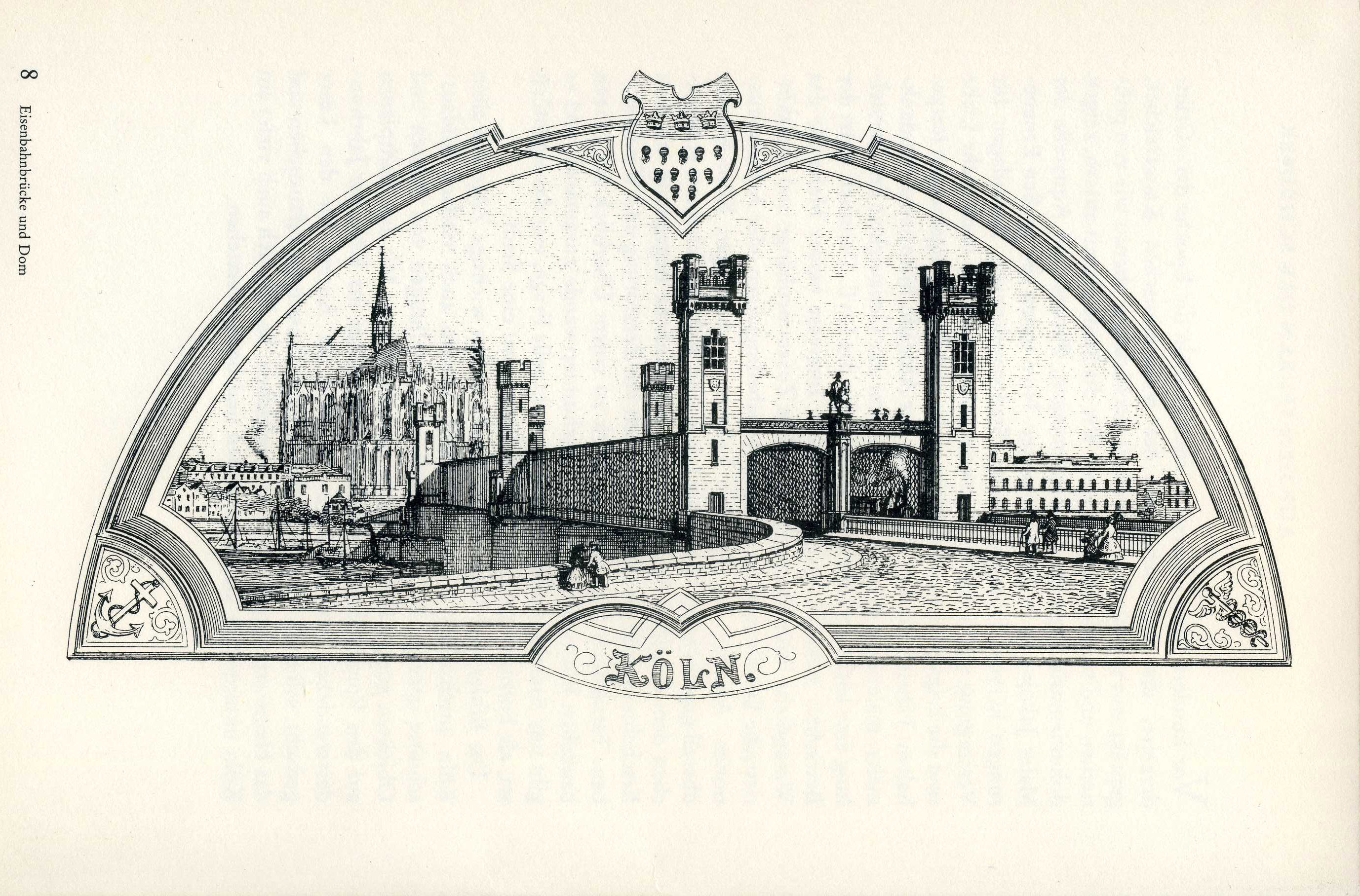 Kölner Eisenbahnbrücke (Dombrücke) und Dom. Ausschnitt eines Stichs von Jakob Scheiner 1865.